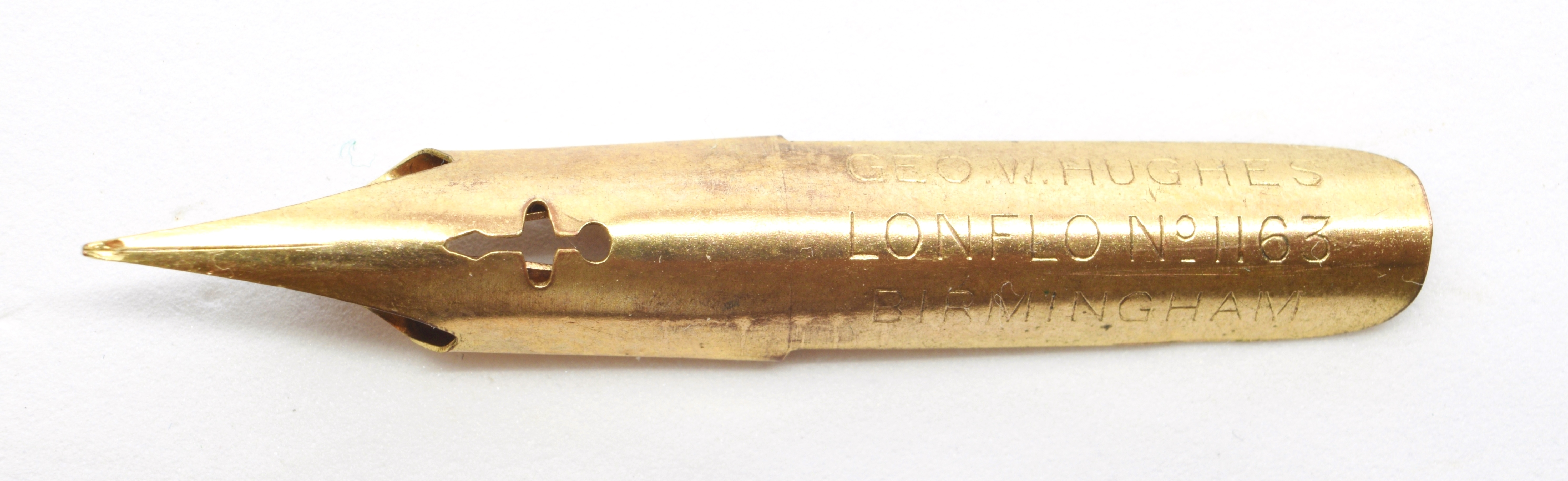 Geo. W. Hughes — № 1163 LONFLO